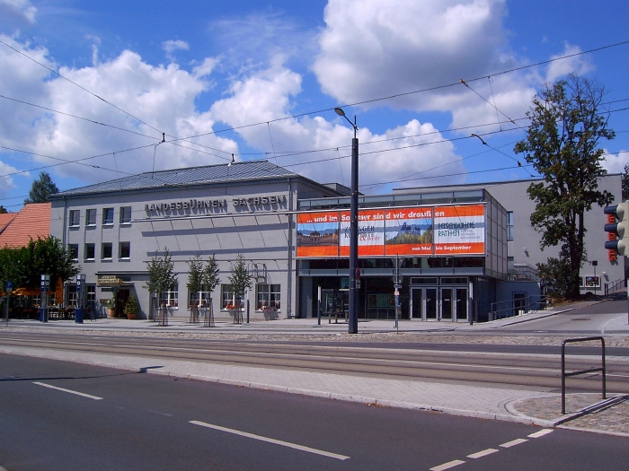 Landesbühnen Sachsen, Stammhaus in Radebeul Home of the Landesbühnen Sachsen (Saxony’s traveling repertory theater) in Radebeul